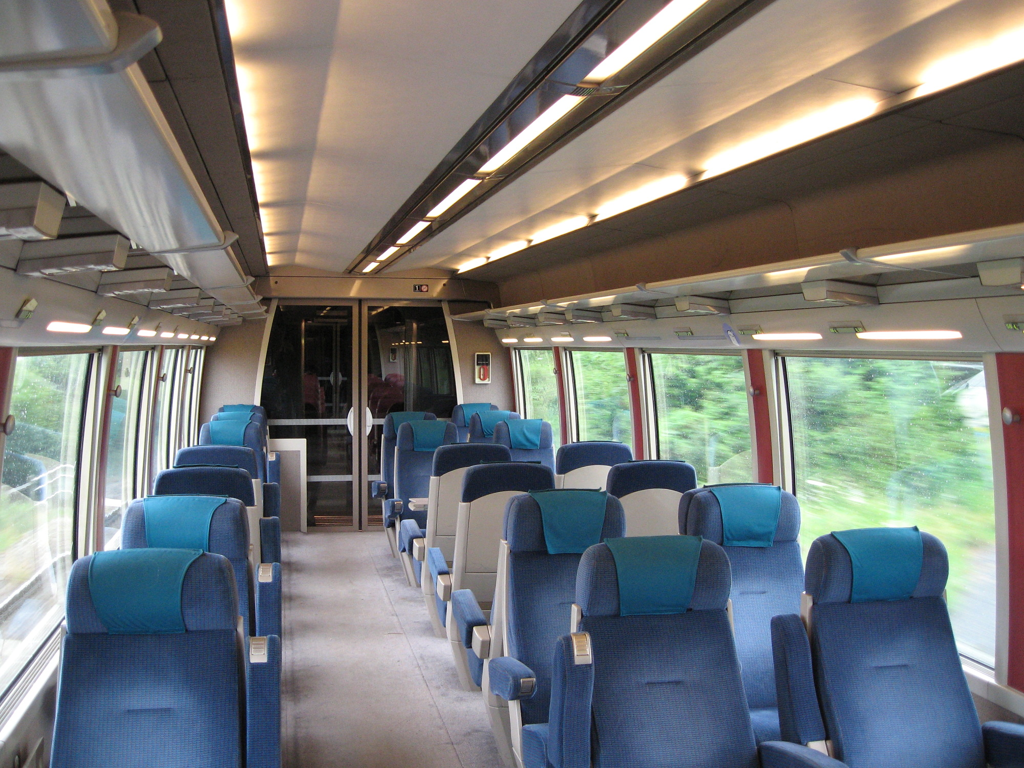 Intérieur du compartiment de première classe d'un X 72500 de la Région Basse-Normandie, situé sur la remorque centrale, circulant entre Paris et Granville.